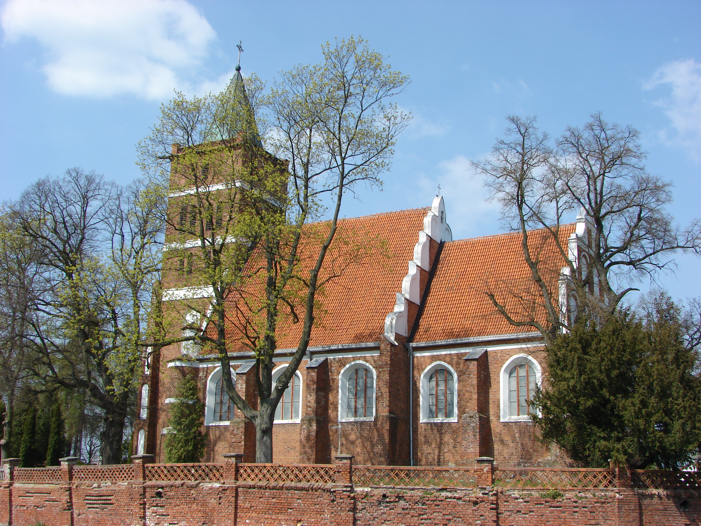 Służewo, Gmina Aleksandrów Kujawski, kościół